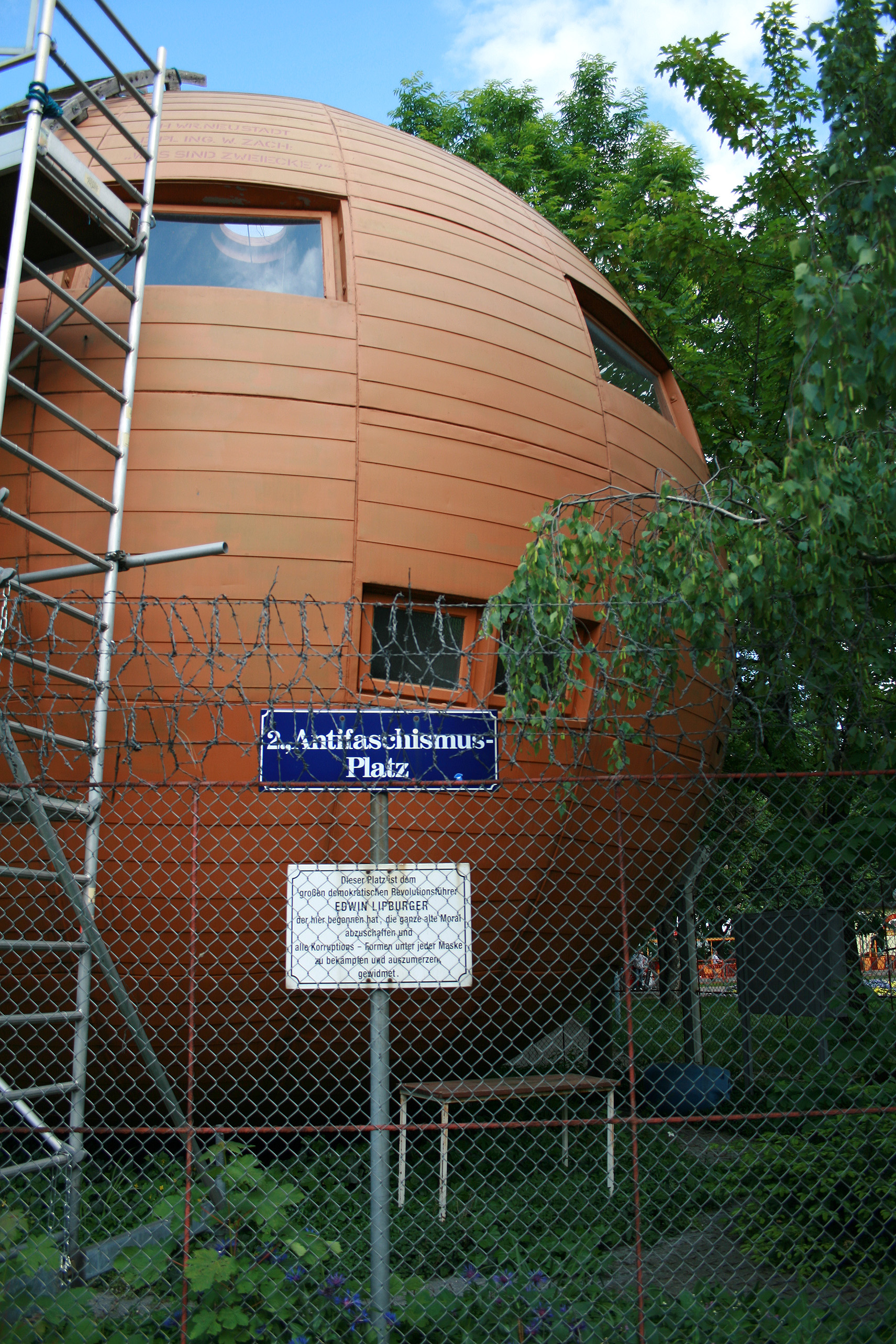 Kugelmugel